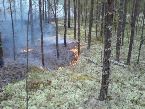 Малая Сосьва (государственный природный заповедник): Государственный природный заповедник «Малая Сосьва» имени В.В. Раевского находится в северо-западной части Западно-Сибирской равнины, в долине среднего течения р. Малая Сосьва - правого притока р. Северная Сосьва. Картографические координаты (СК-42) Точки координат X Y: 1) 63°10' 64°24'; 2) 61°45 63°40'; 3) 62°25 64°45'., Берёзовский район, Советский район, Октябрьский район, Ханты-Мансийский автономный округ This image is related to the protected area of Russia number 8600010